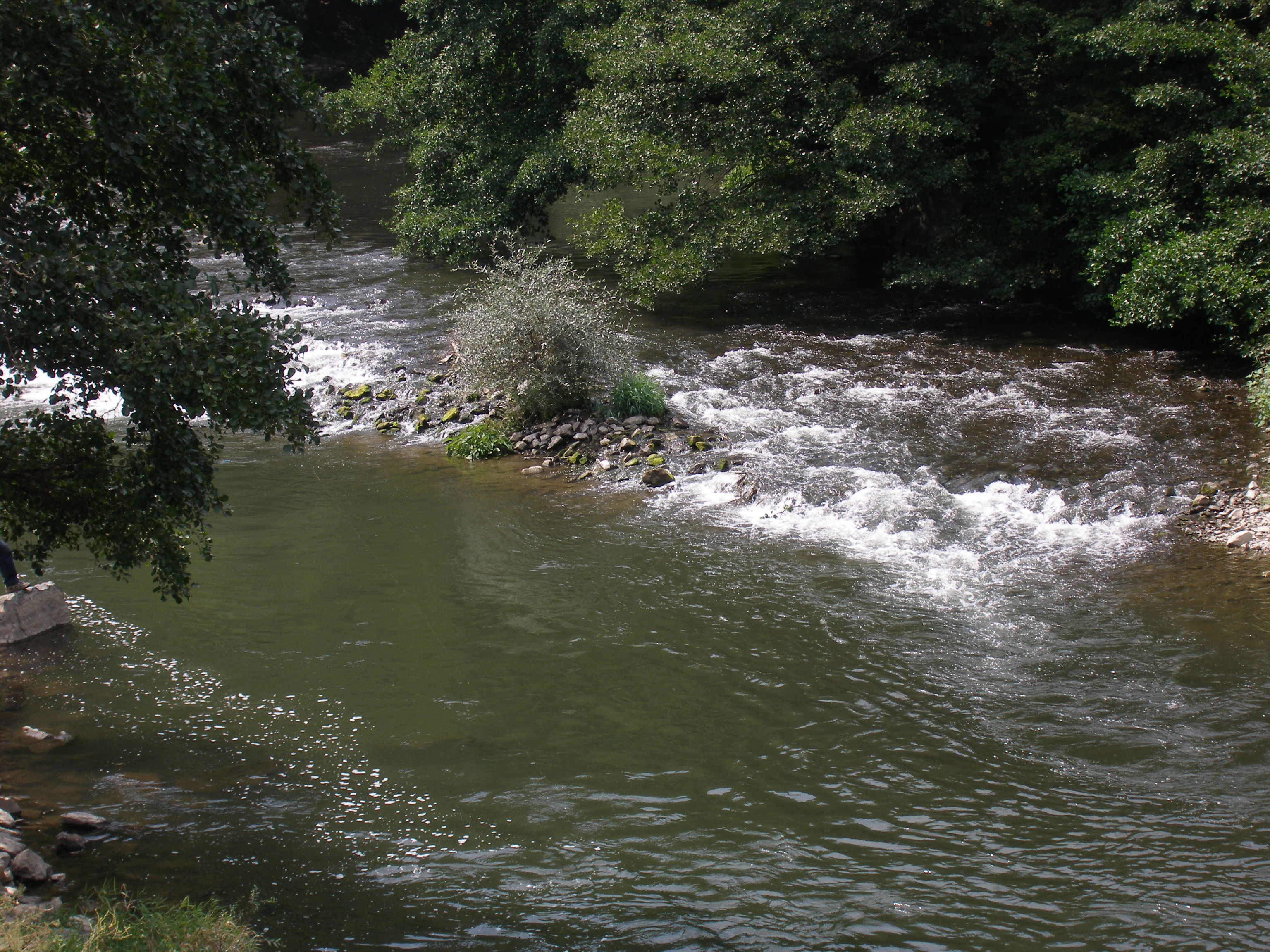 Река Струма